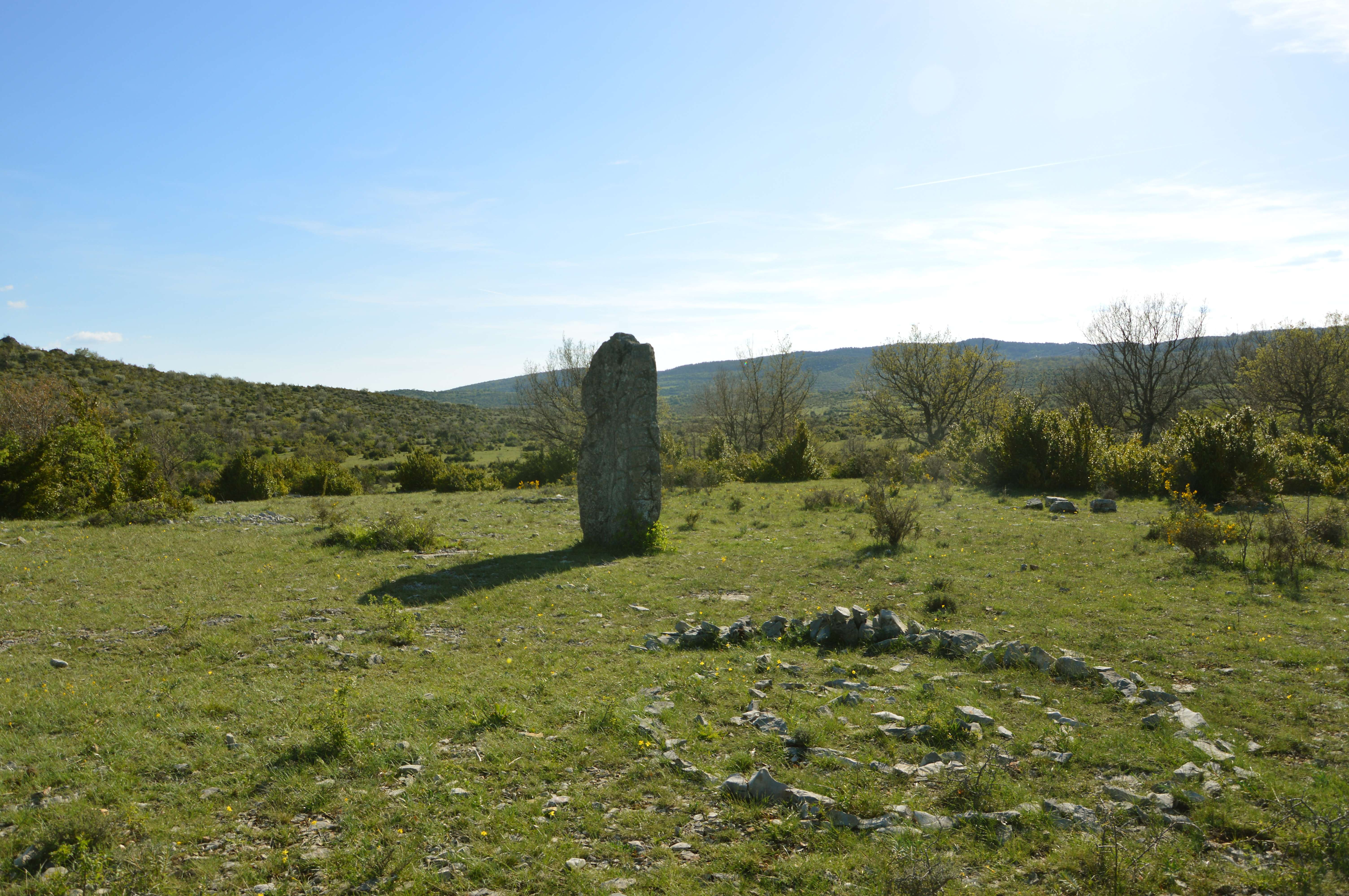 Menhir du Serre de la Glèisa sur le causse de Blandas